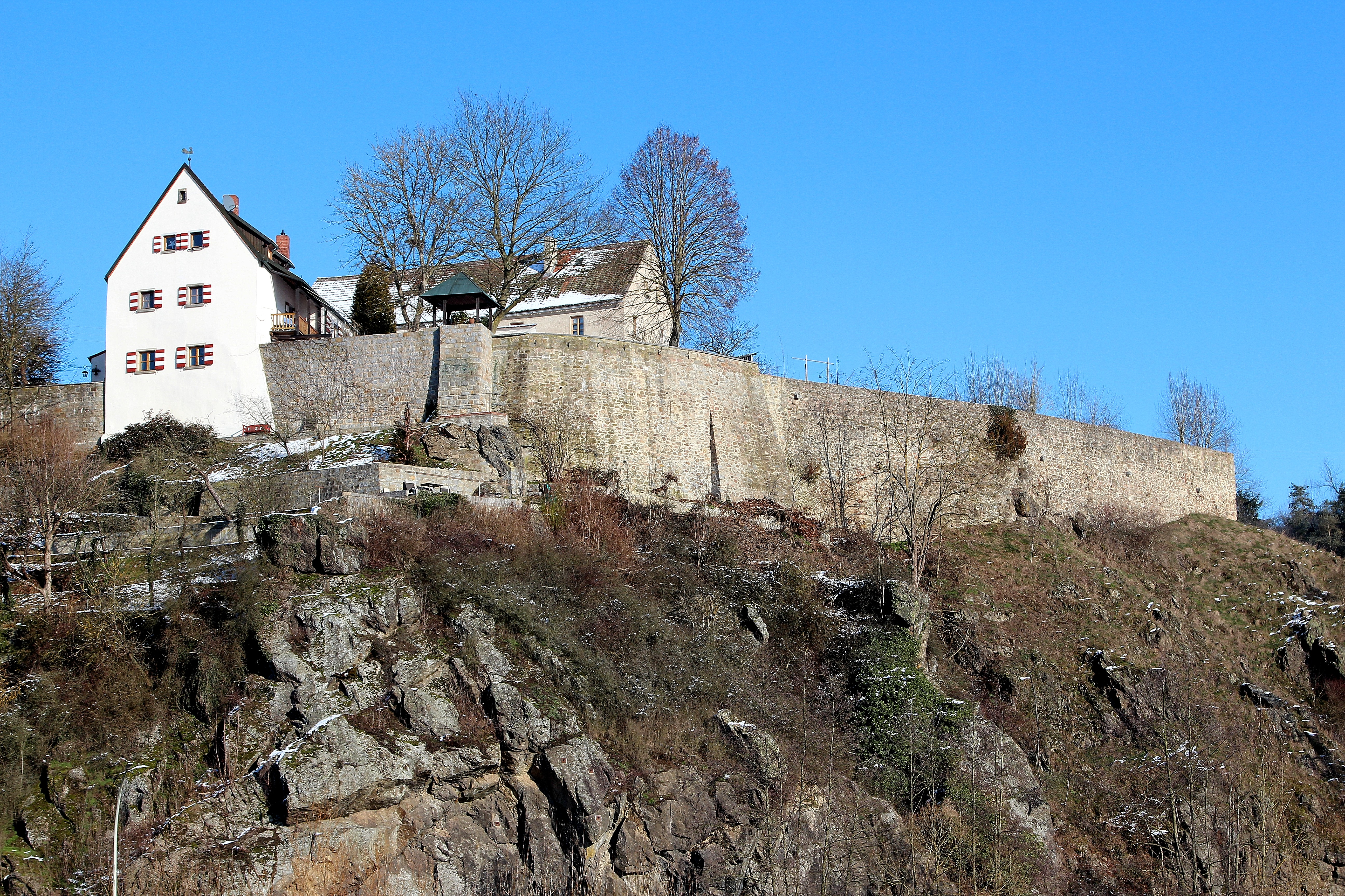 Stein, Reste der Burganlage Stein an der Pfreimd; Stadt Pfreimd, Landkreis Schwandorf, Oberpfalz, Bayern (2016)